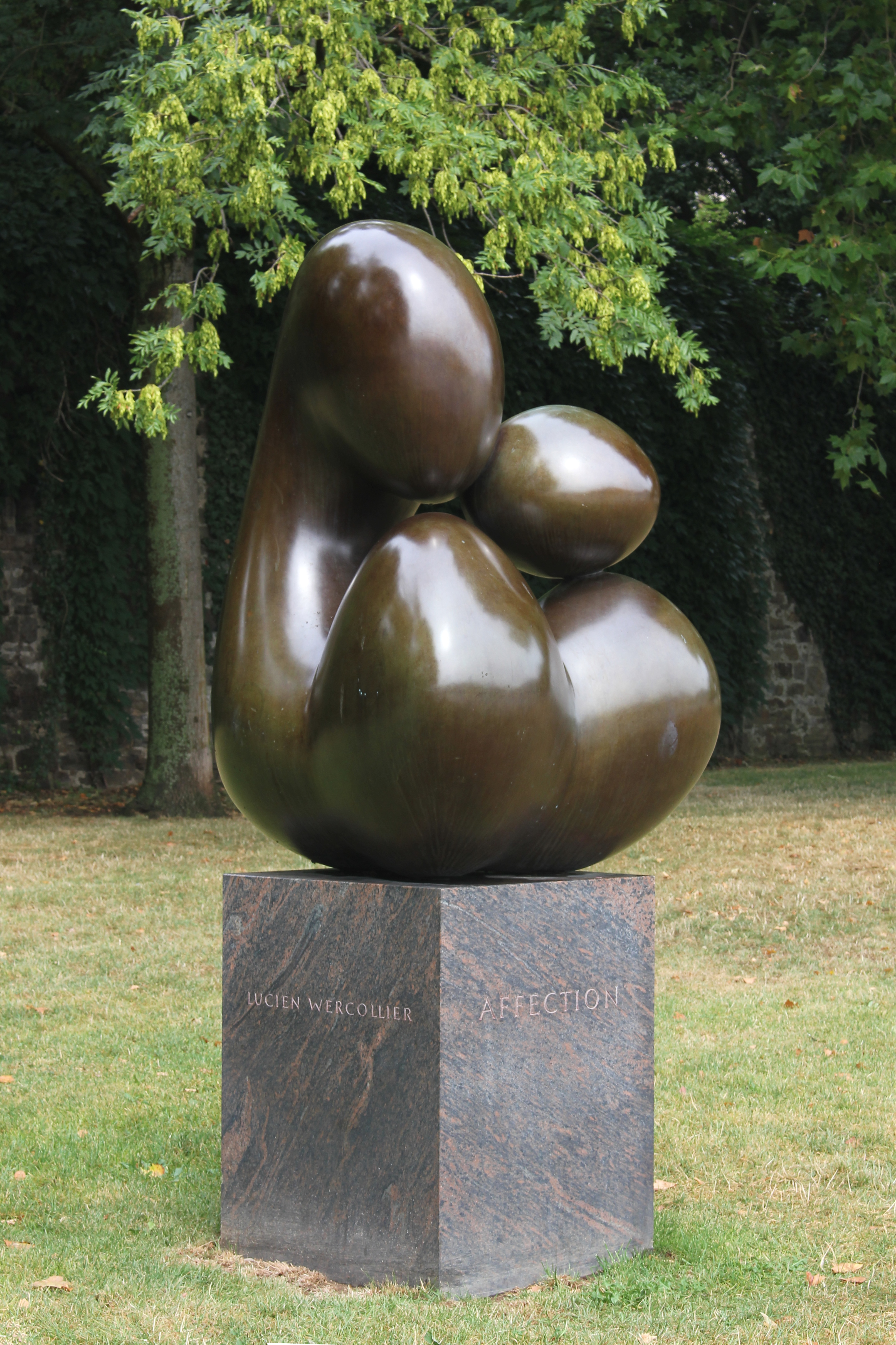 „Affection“ (Zuneigung) – Skulptur von Lucien Wercollier, Bronze, gegossen in St. Remy-les-Chevreuse, 1992 von der Casino-Gesellschaft der Stadt Koblenz geschenkt